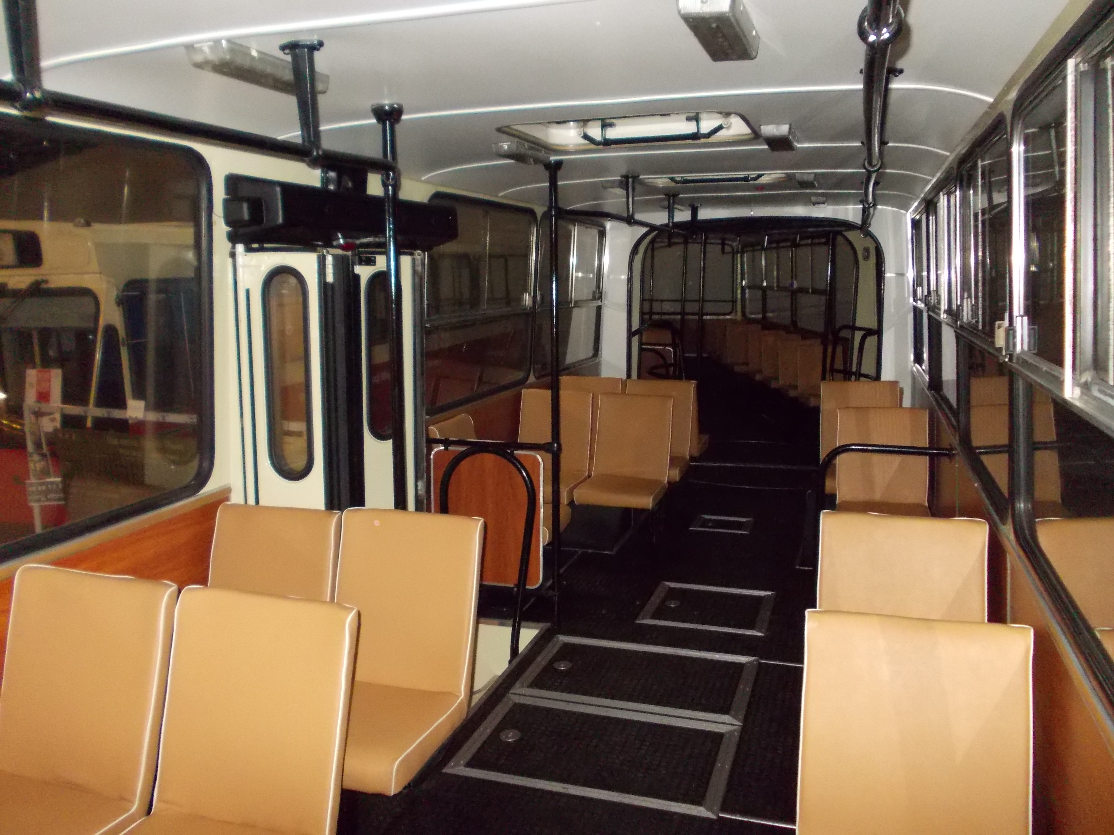 Ikarus 280 podczas ekspozycji historycznej towarzyszącej targom SilesiaKOMUNIKACJA 2014 w Sosnowcu.